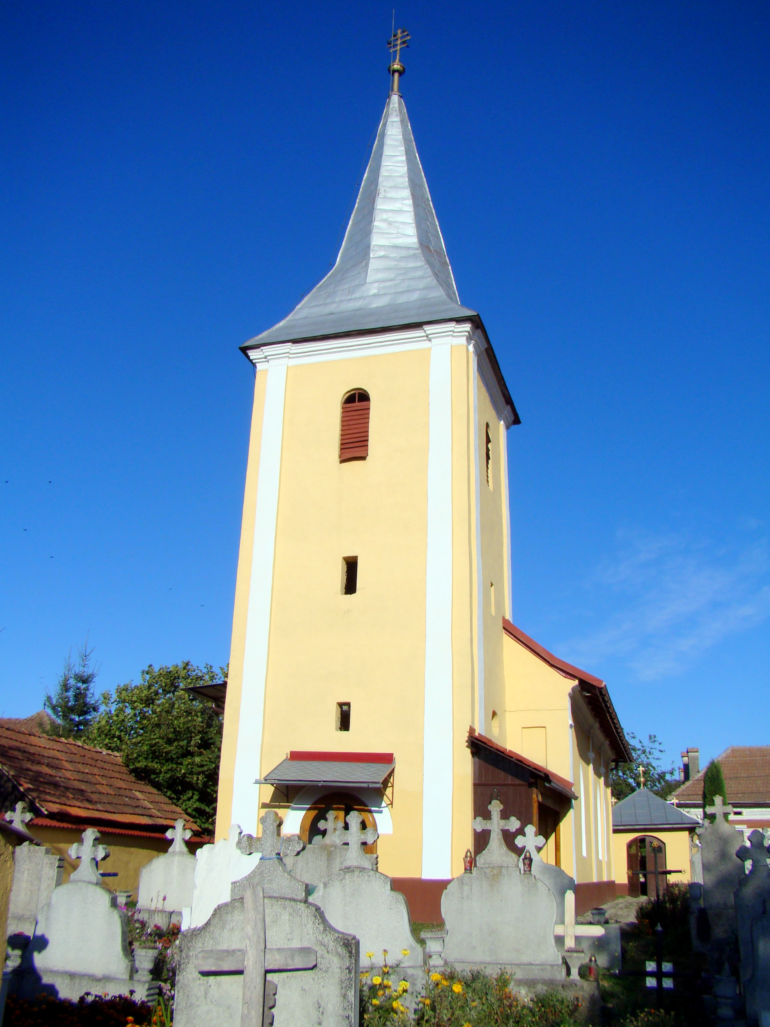 Ansamblul bisericii „Sf. Nicolae”, sat Voivodeni; comuna Voila 221 sec. XVIII